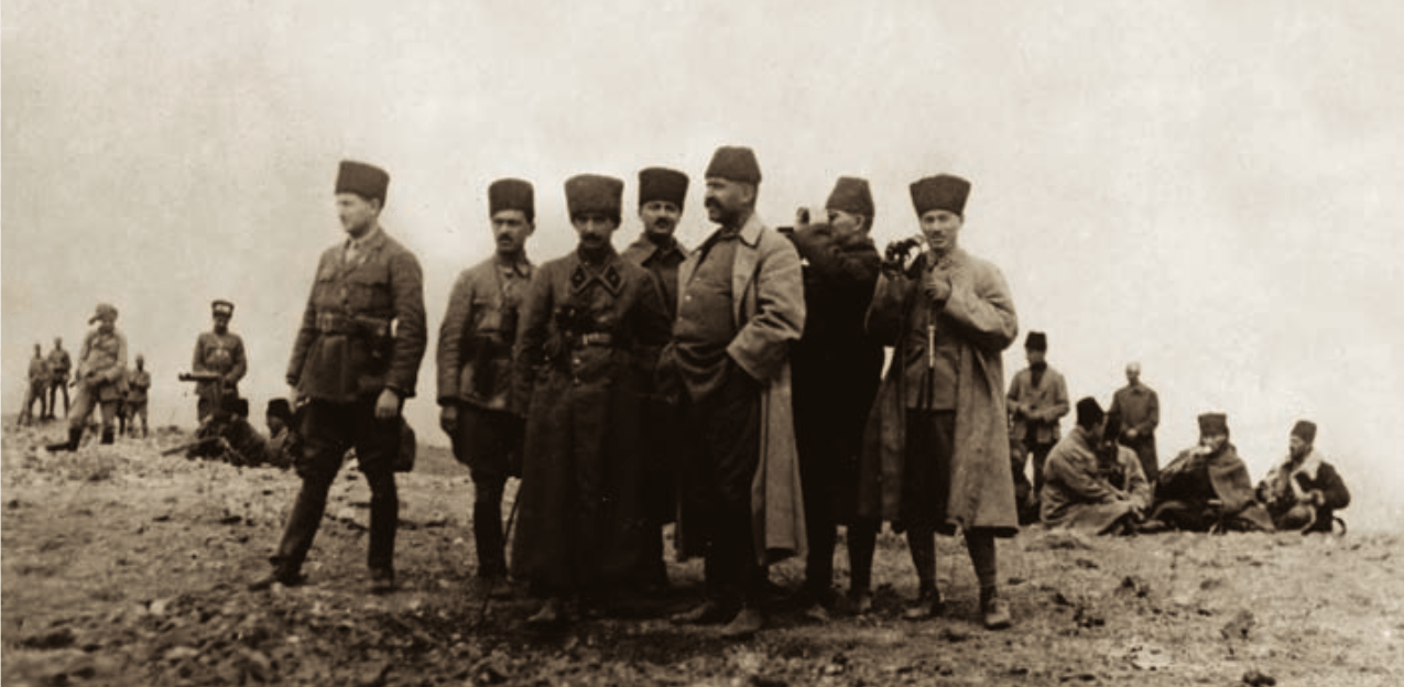 Zafer Tepe, Polatlı, Ankara, 9 Eylül 1921